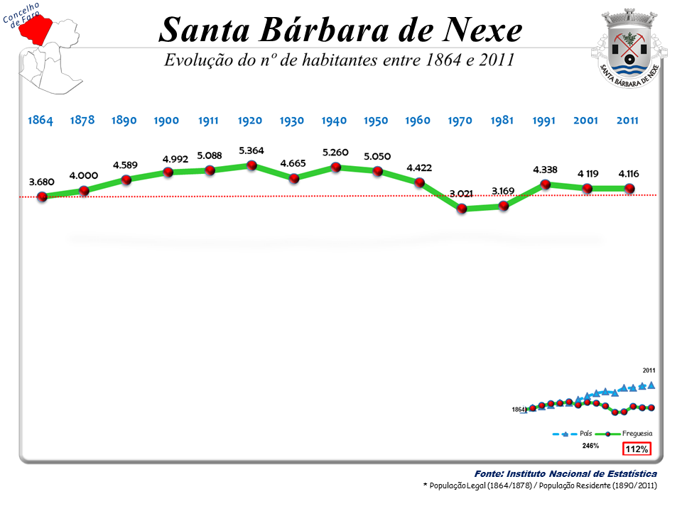 Censos 1864/2011